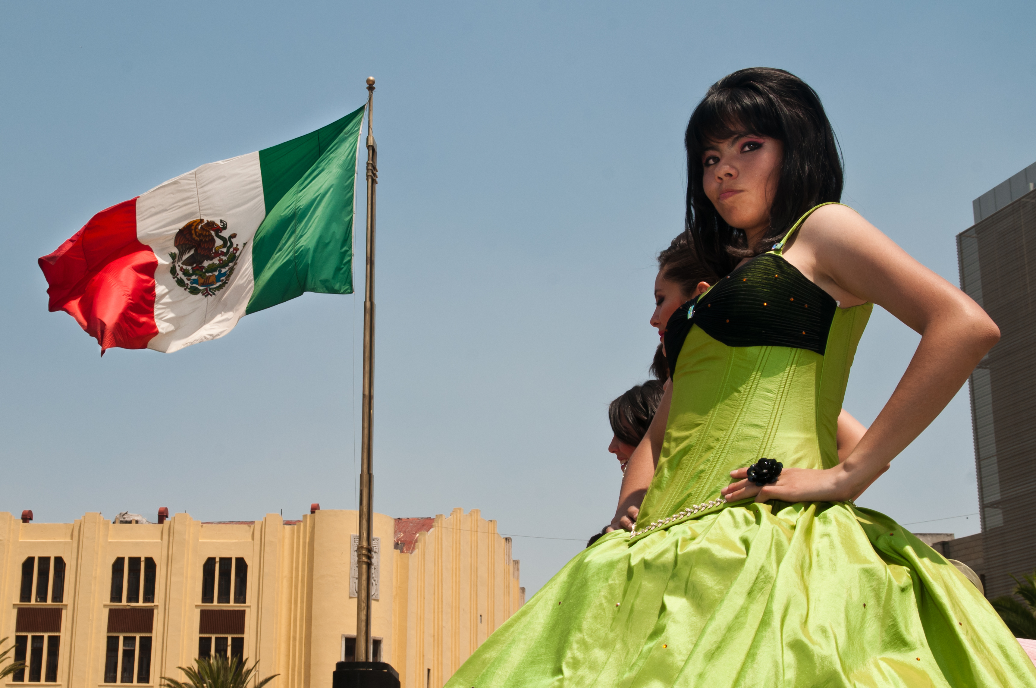 Ya empezó la actividad de las Quinceañeras de este año. La pasarela fue en el Monumento a la Revolución. Ahí, los comerciantes de la Lagunilla presentaron los modelos de vestidos más exclusivos.